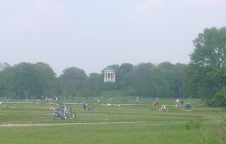 Photographie personnelle de l'Englishe Garten de Munich